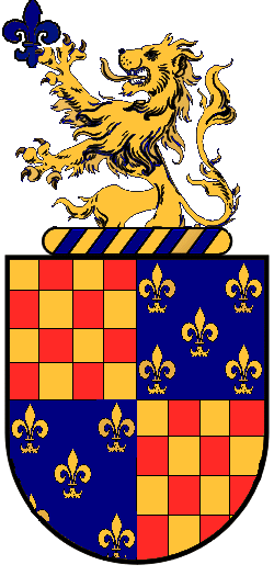 Armas da Família Alvim